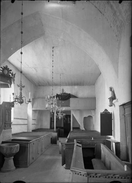 Interiör mot väster. Observera "Viklaumadonnans" dåvarande sittplats.